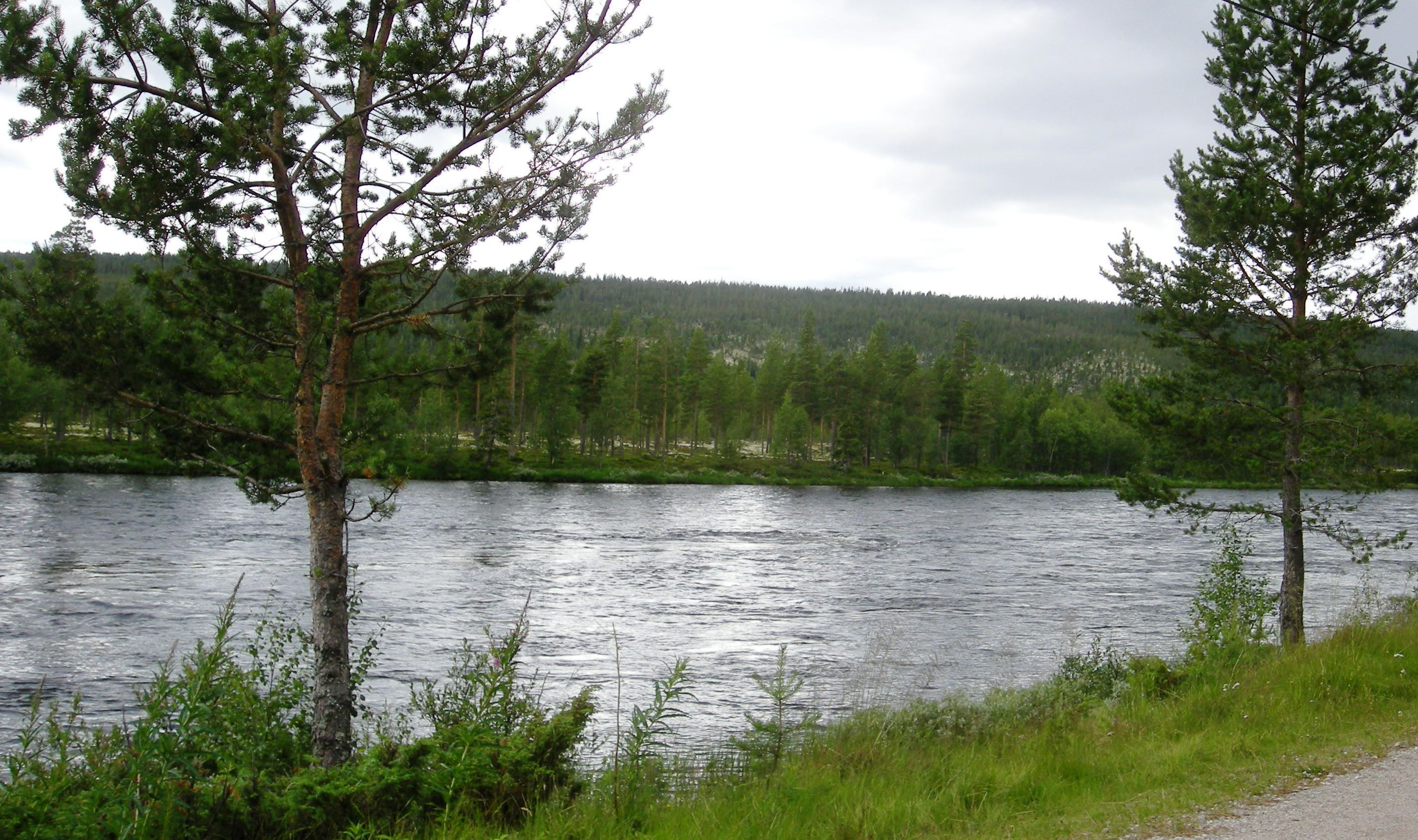 Femundselva mellom Søre Elvdal og Elvbrua